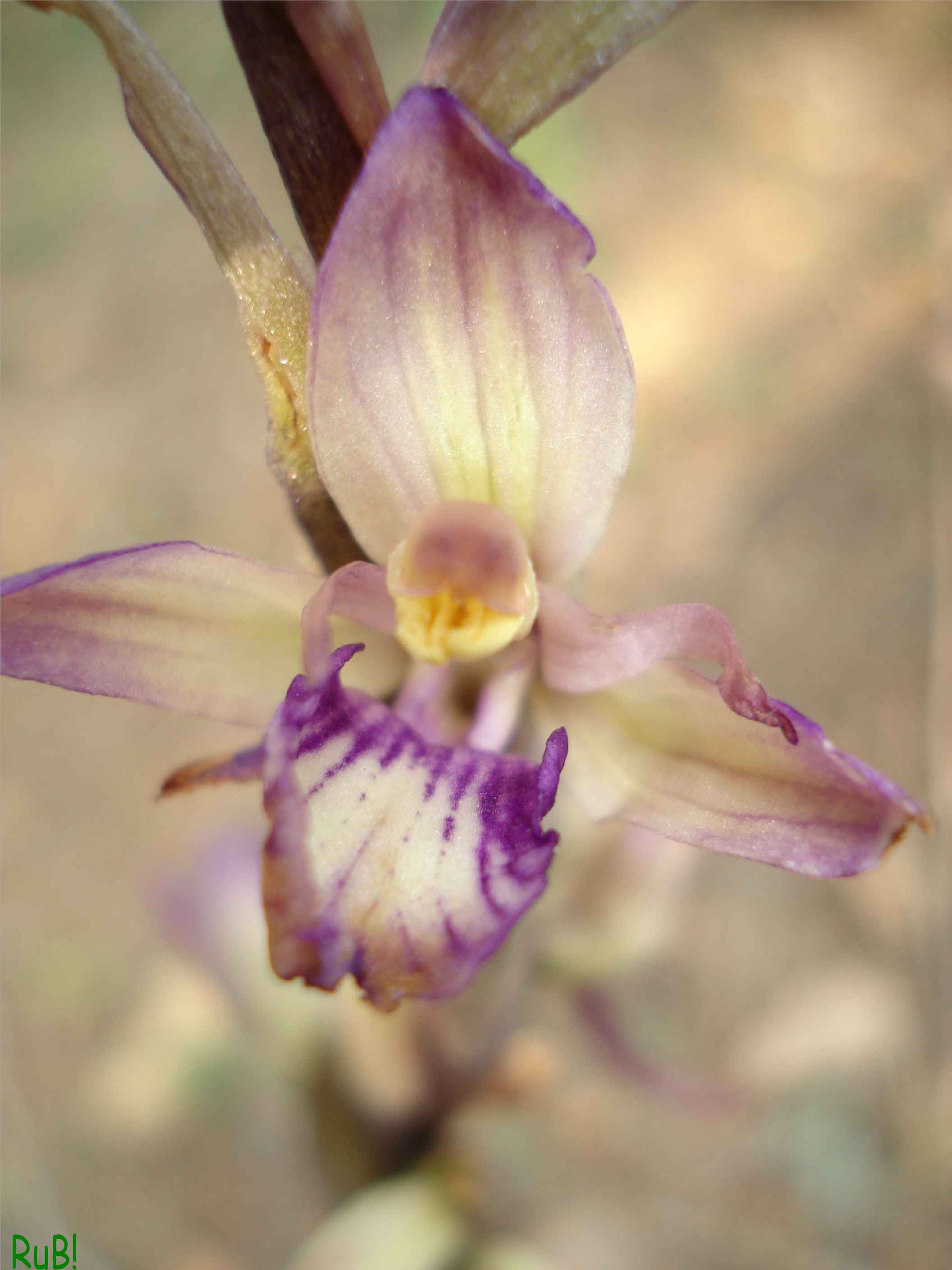 Limodorum abortivum, Orchidée - Limodore à feuilles avortées : Fleur